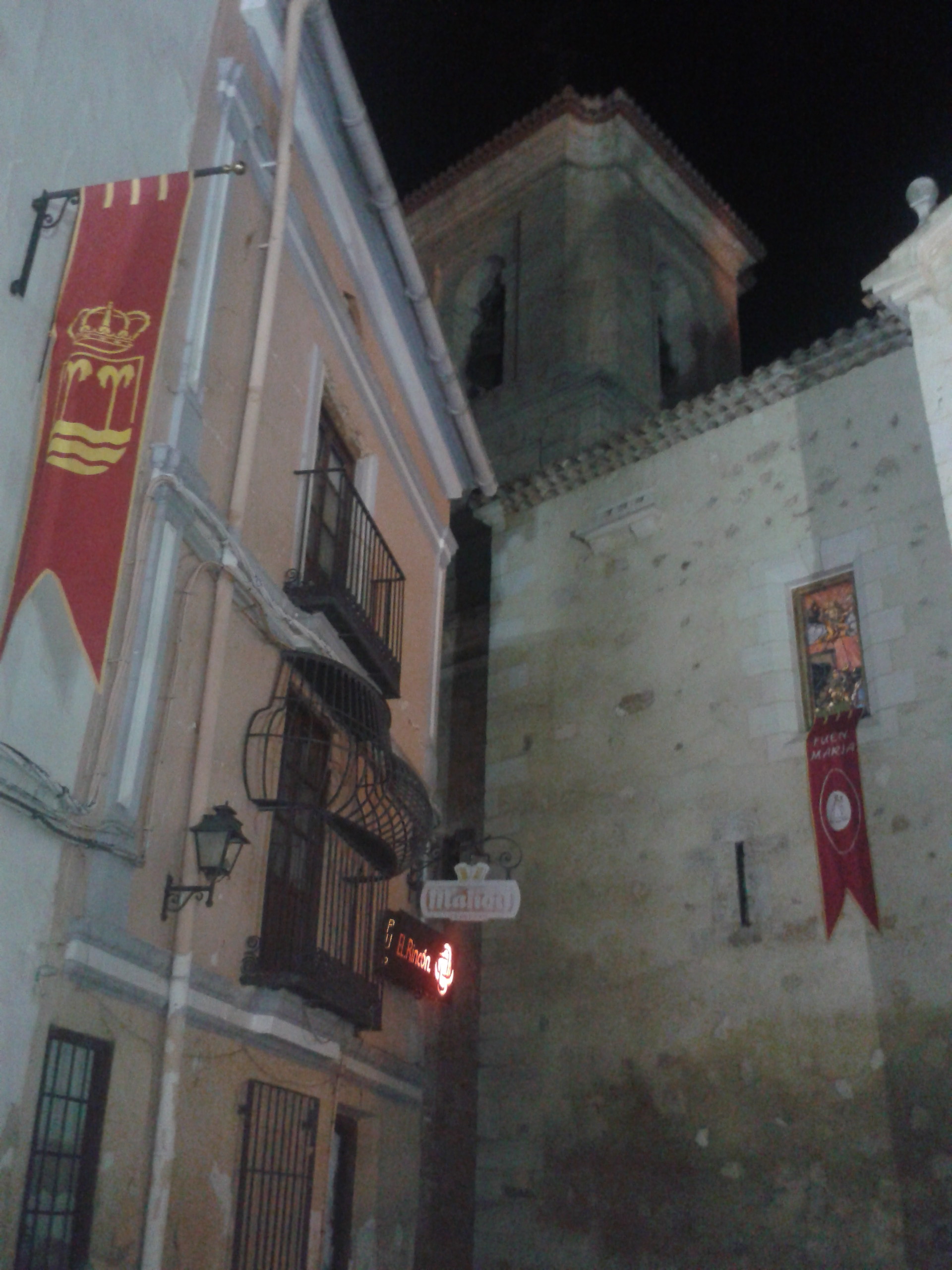 Torre de la Iglesia de noche. En la Fiesta de la Fuen María, así como el Septenario de la Virgen de Tejeda, el pueblo se engalana con banderas al estilo medieval.